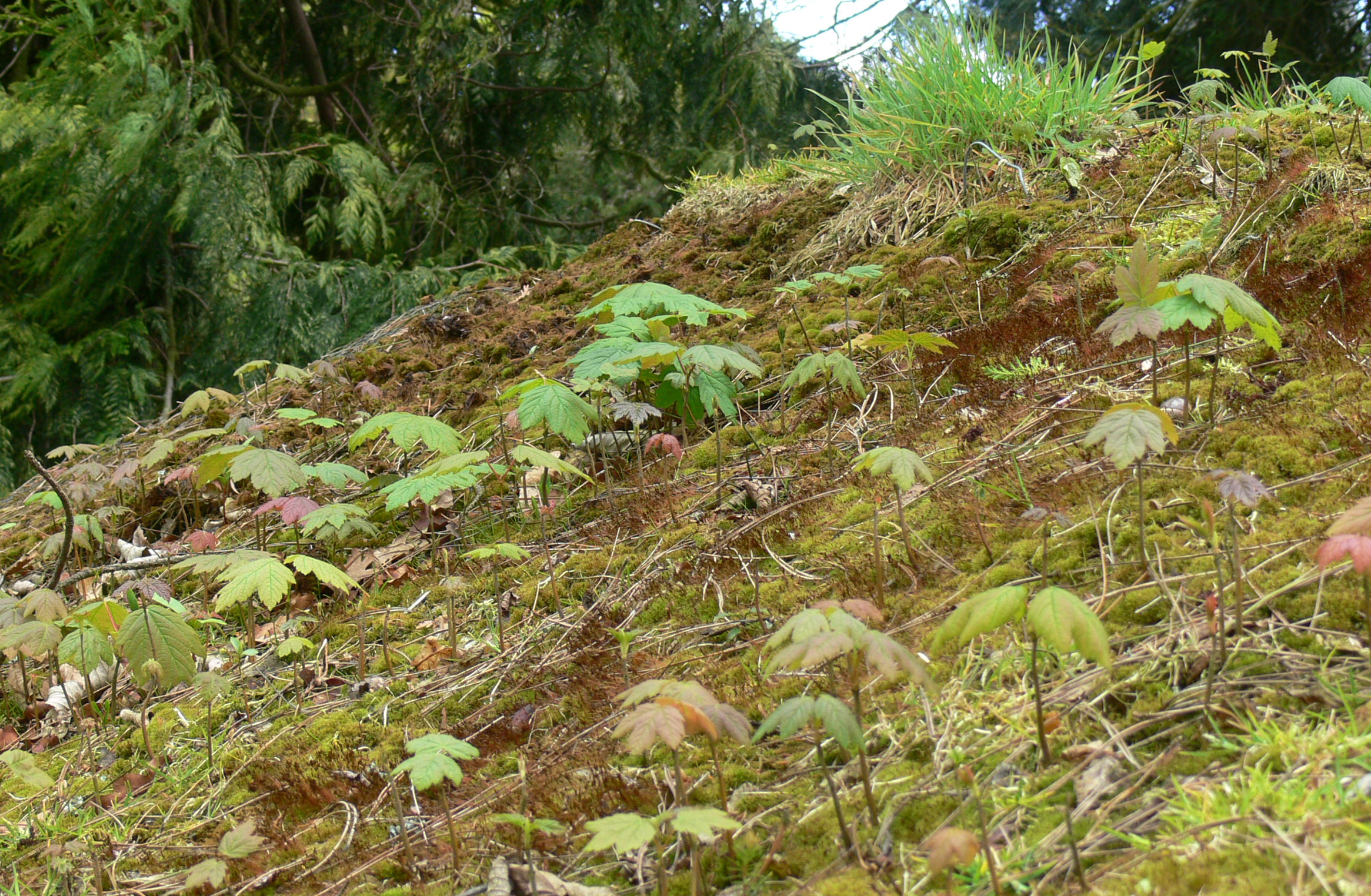 Pousses d'arbres (ici des érables) sur toit de chaume couvert de mousse. De nombreuses graines d'arbres y germent au printemps, mais meurent en été quand le toit sèche complètement.